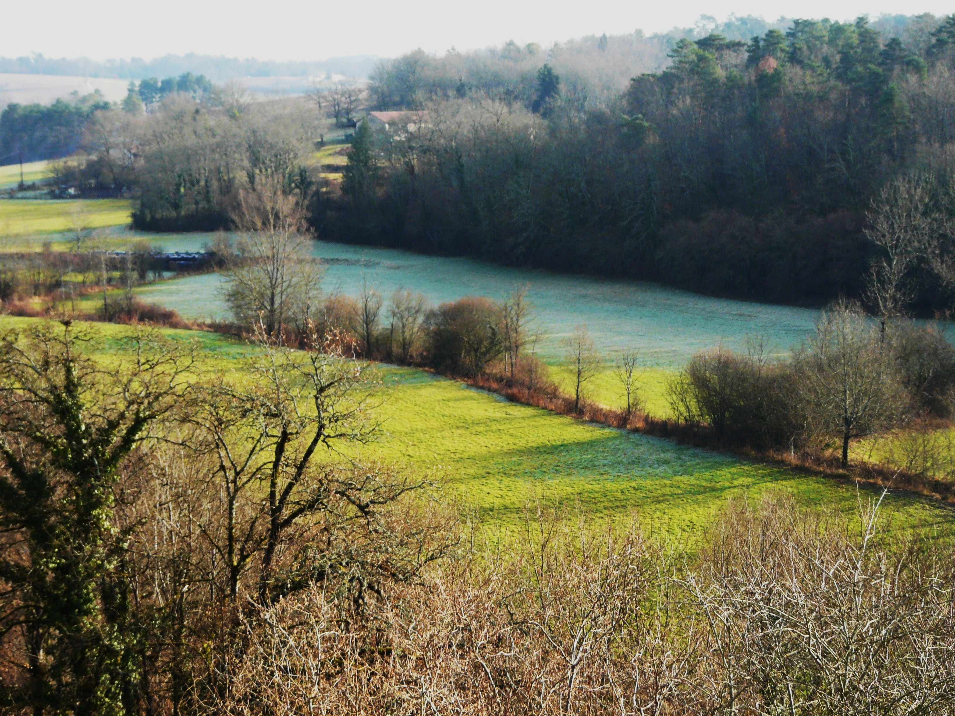 La vallée du Trincou vue depuis le bourg de Condat-sur-Trincou, Dordogne, France (le Trincou coule au milieu du pré, au mince rideau d'arbres)